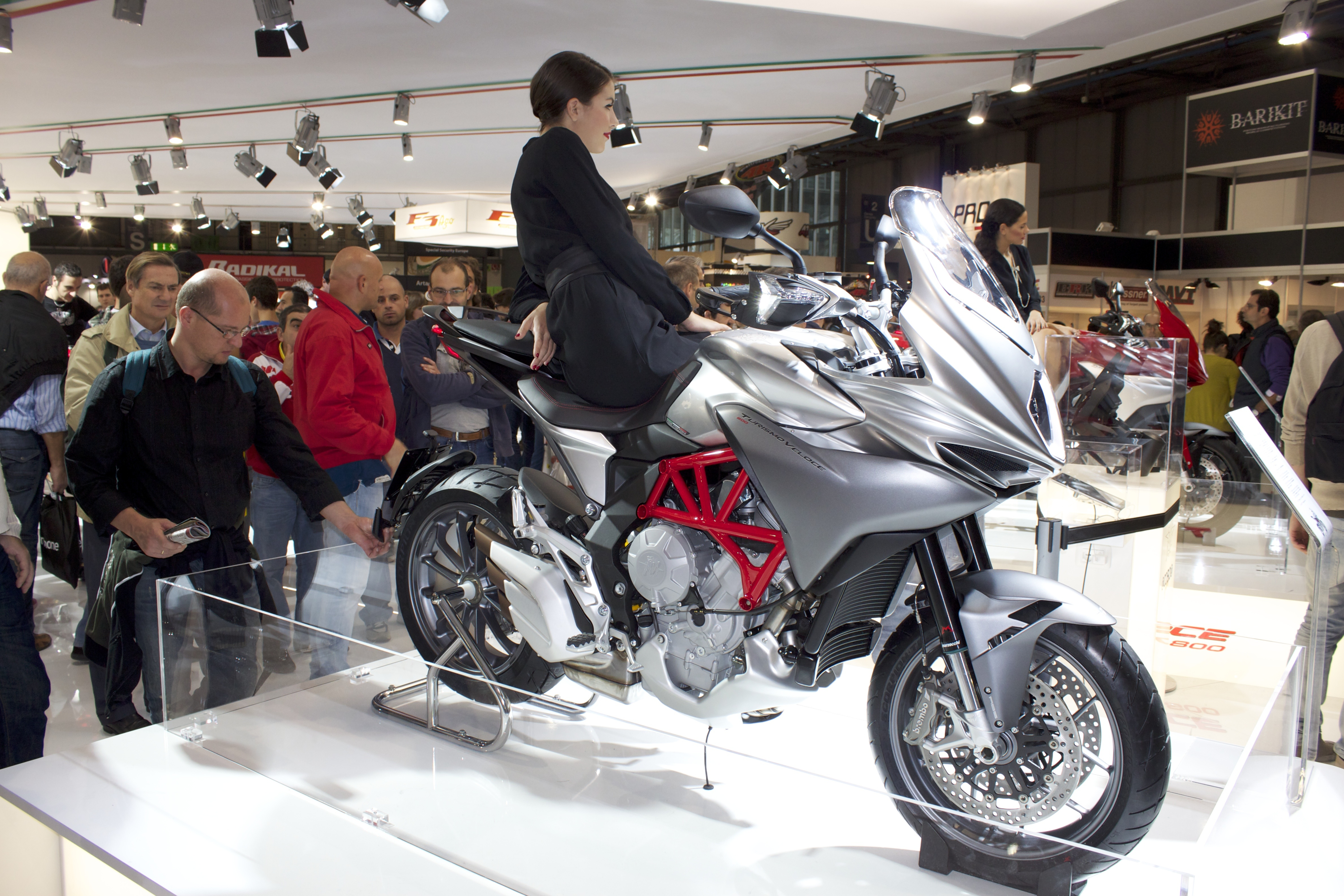 MV Agusta - Turismo Veloce 800